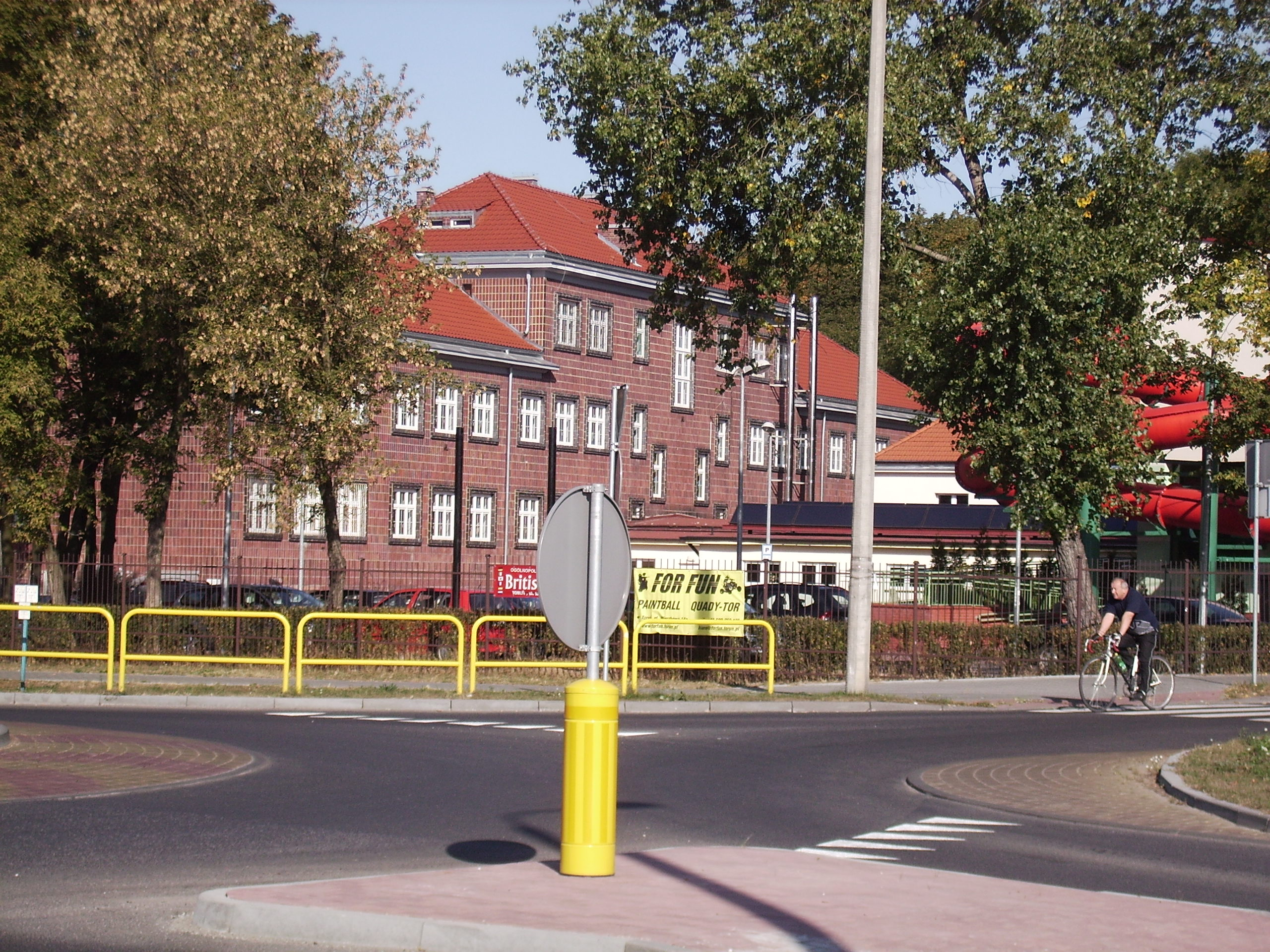 ZS 24 w Toruniu